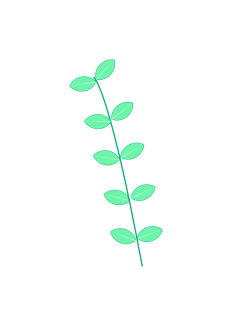 opposite leaf arrangement.